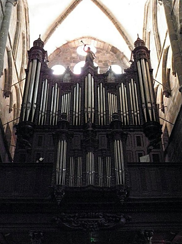 Grandes-Orgues de la cathédrale Saint-Samson de Dol-de-Bretagne (35).